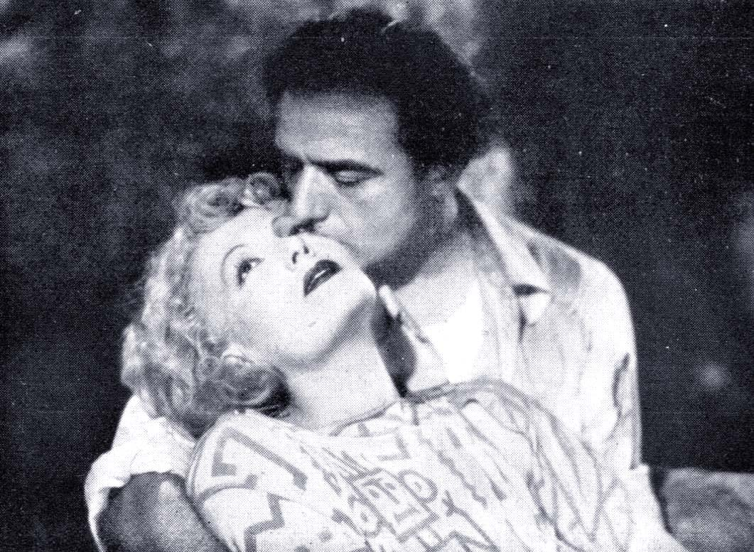 Isa Miranda e Fosco Giachetti in Senza cielo, regia A Guarini, prod Continentalcine, Roma, 1940